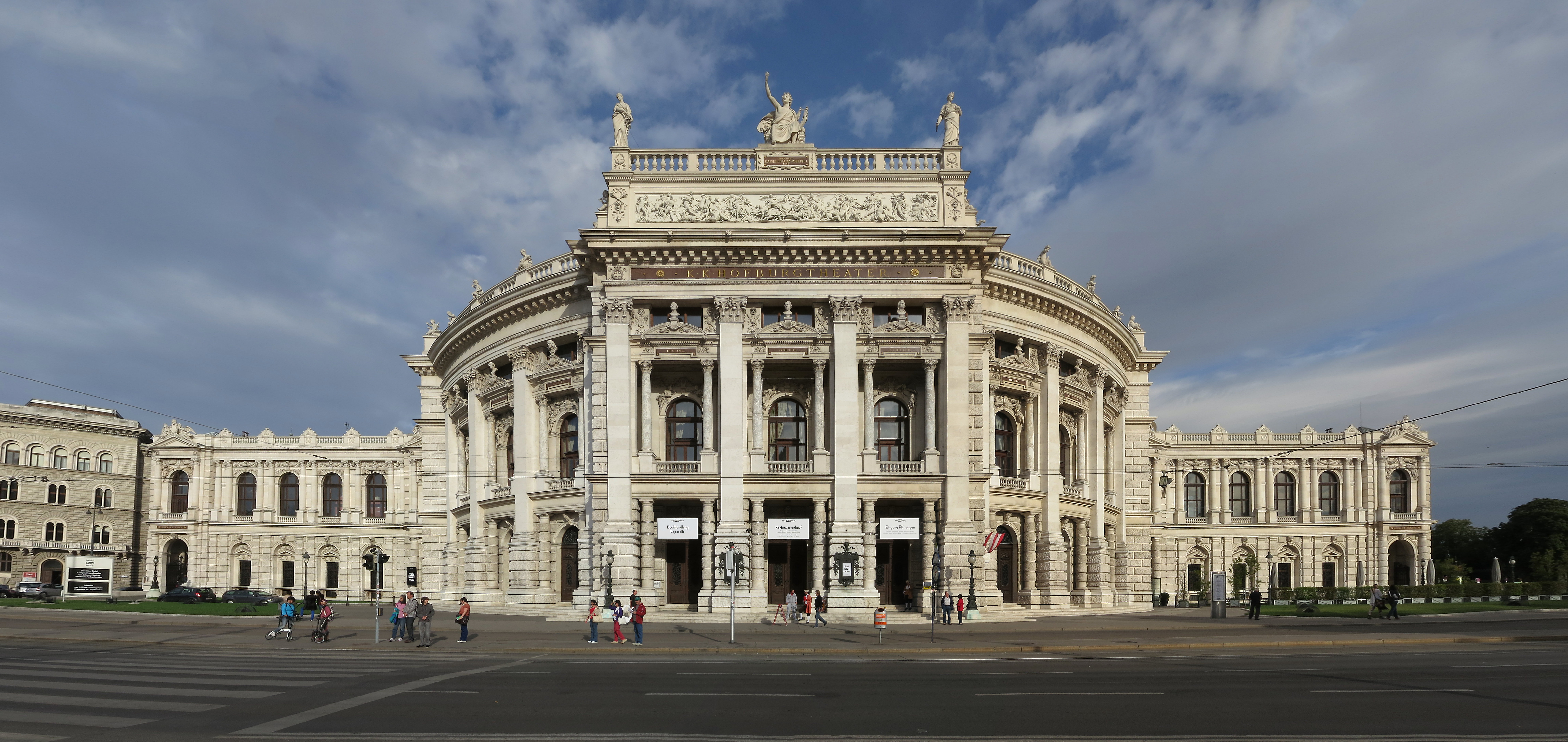 Burgtheater